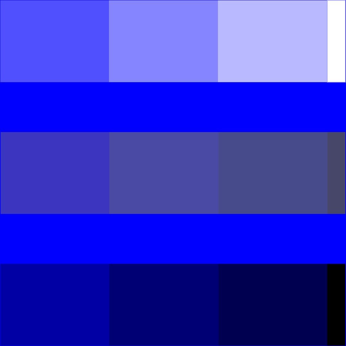 Farbbeziehung Monochromie: Das Beispiel zeigt eine Monochromie, ein mit Weiß, Grau und Schwarz kombiniertes Blau.